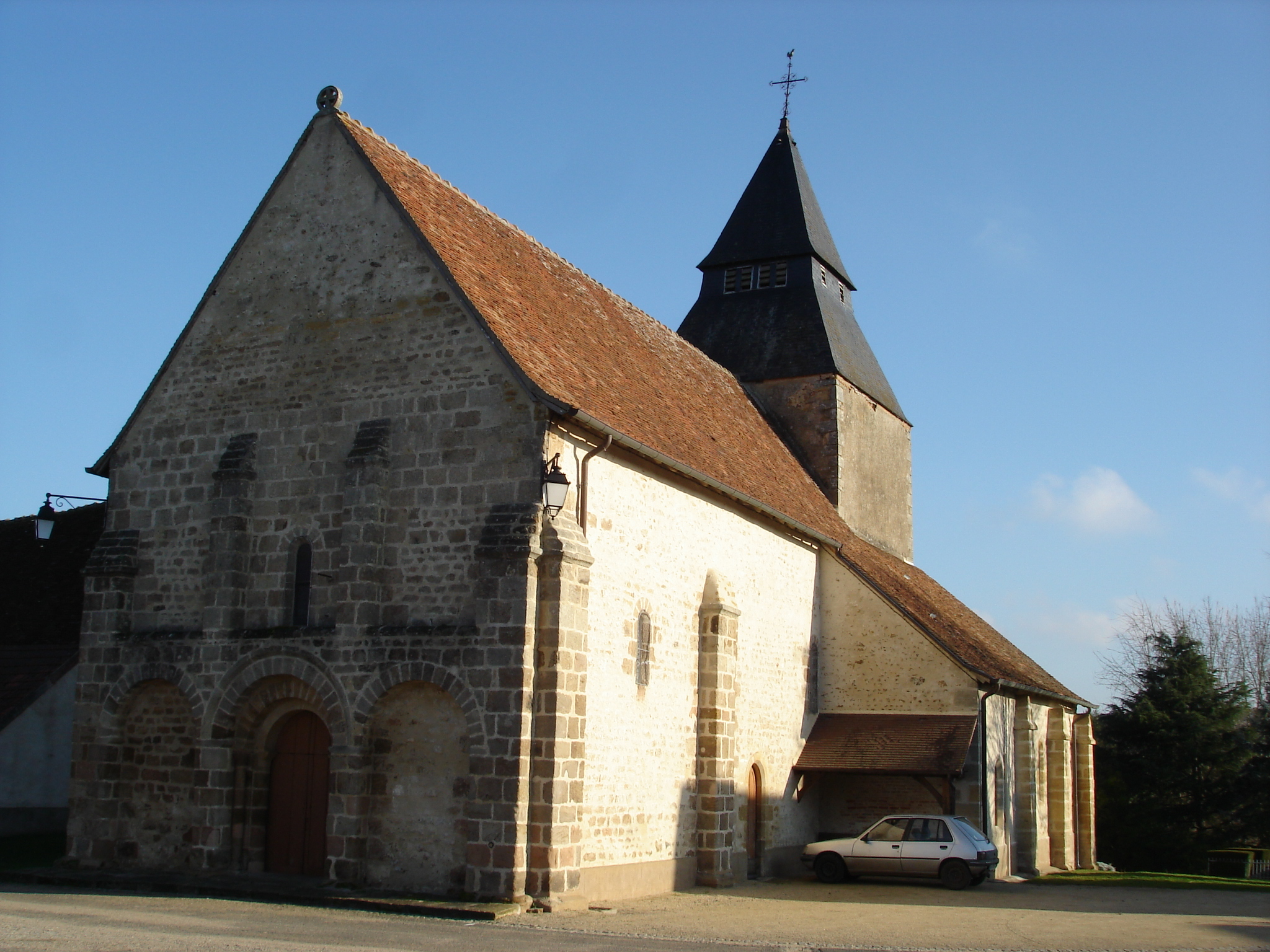 Briantes (36) : L'église Saint-Aignan.